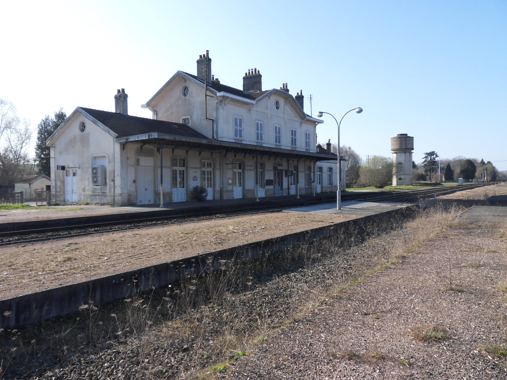 Port-d'Atelier-Amance - Le bâtiment voyageurs.Ligne Paris-Est - Mulhouse-Ville et Ligne d'Aillevillers à Port-d'Atelier-Amance. Vue côté voies.